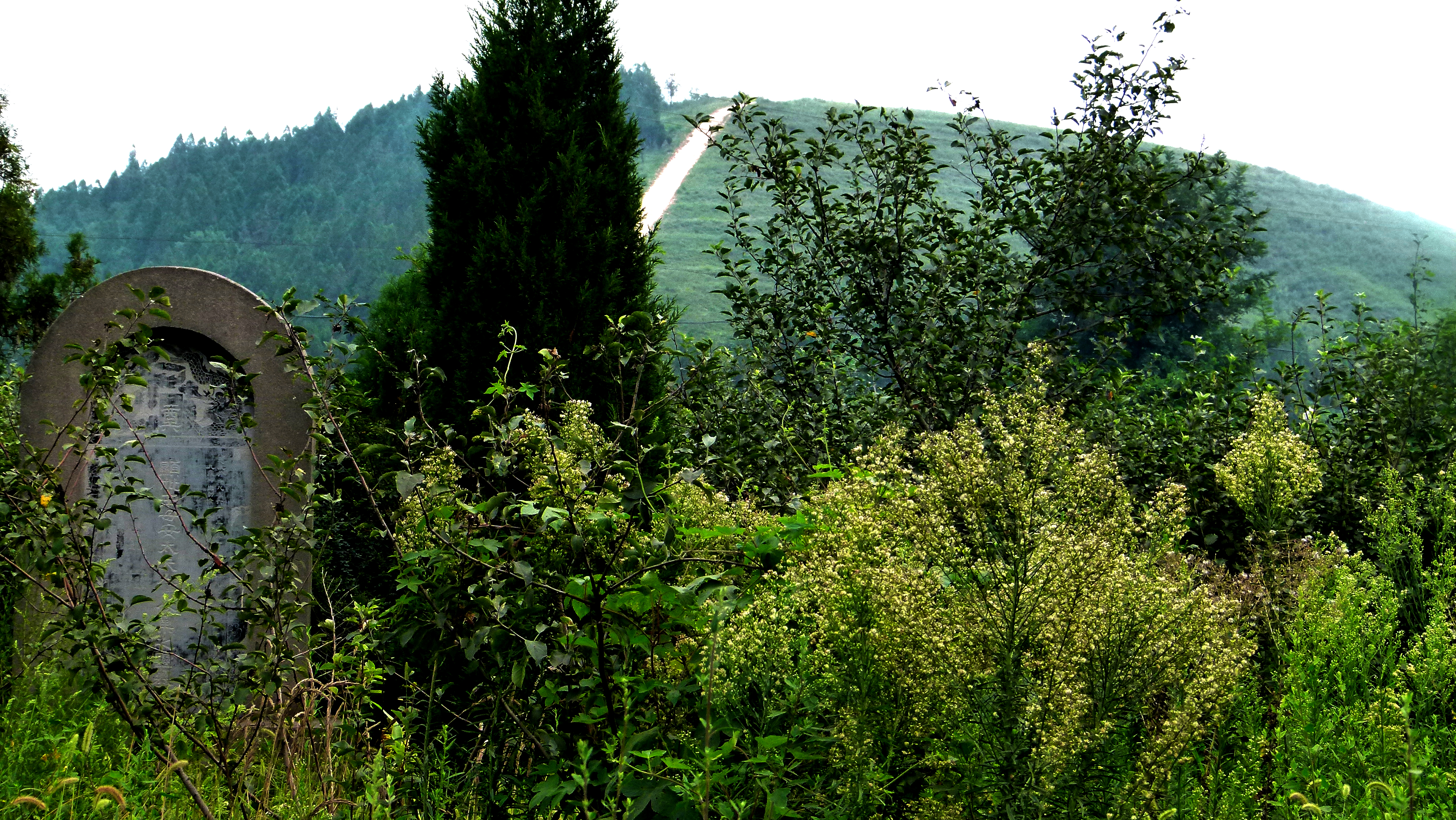 Pingling - Grab der Kaiserin